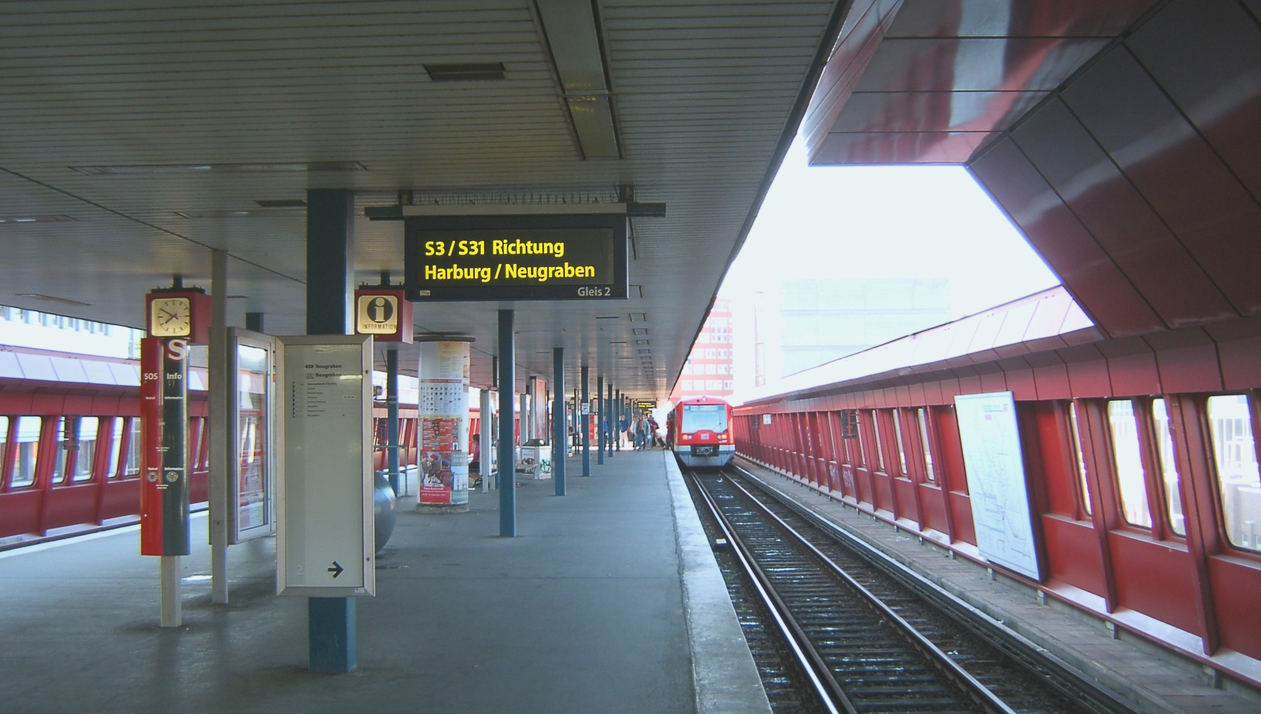 Bildbeschreibung: Hamburg, Hammerbrook, S-Bahnhaltpunkt, Bahnsteig Fotograf: selbst Datum 1.7.2006